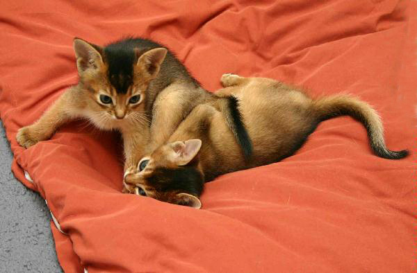 Spielende Abessinierkätzchen (Gatobelo's Nena und Gatobelo's Nele)